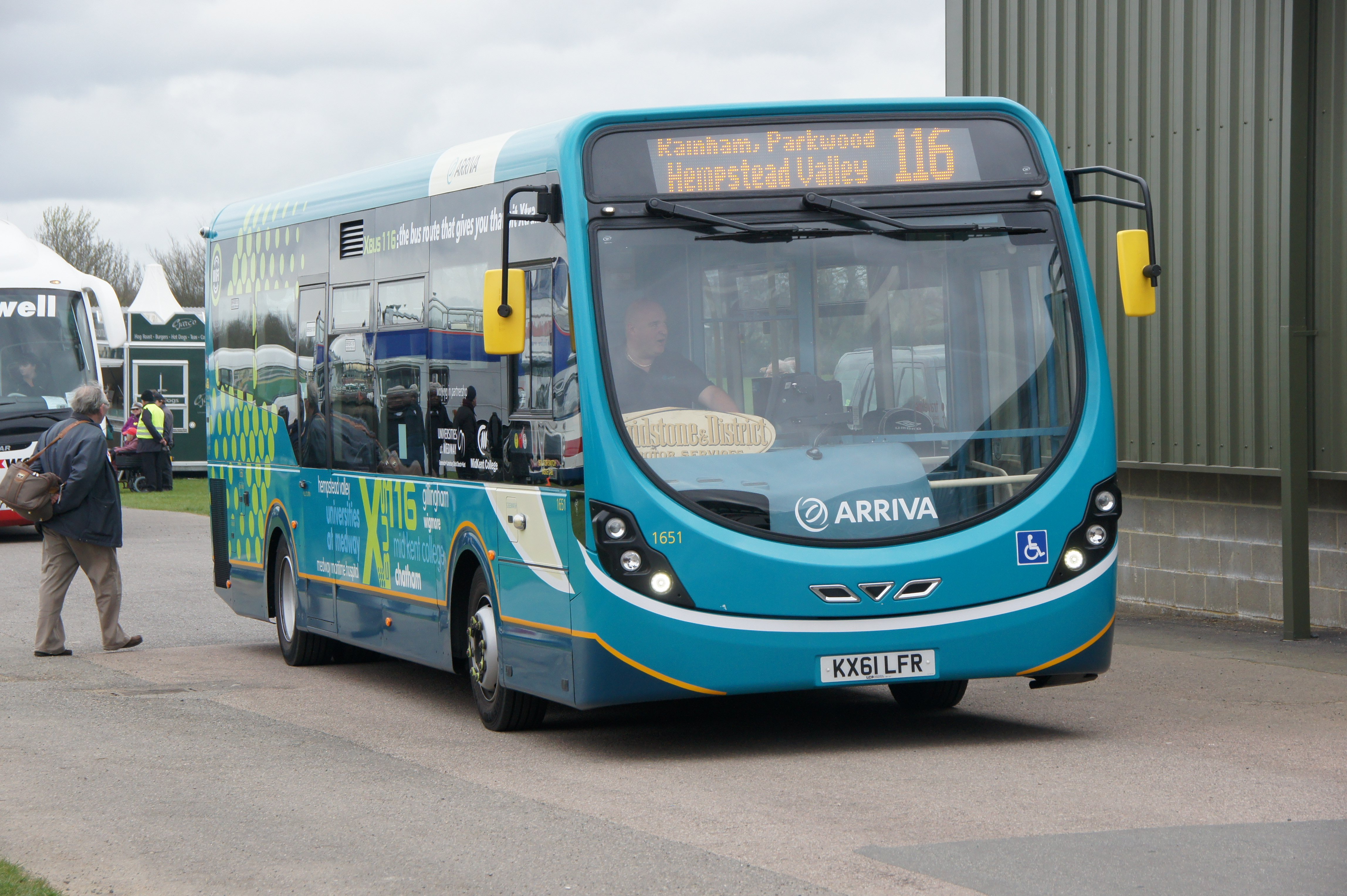 KX61LFR-1 310312 CPS